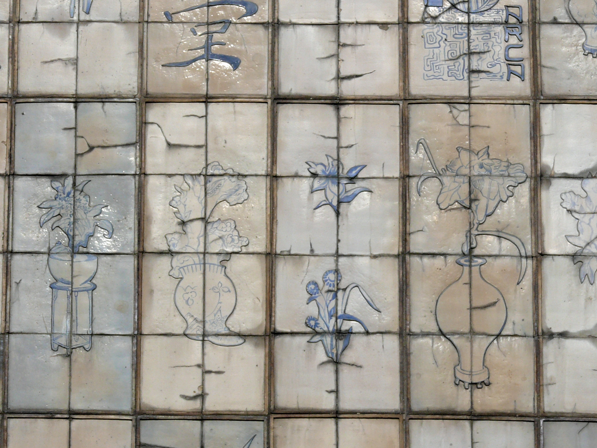 Panneaux de façade de l'Église Notre-Dame-des-Missions d'Épinay-sur-Seine